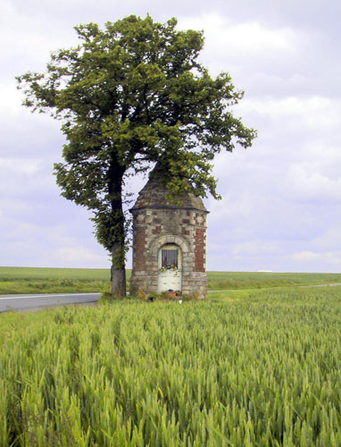 La chapelle d'Etrun